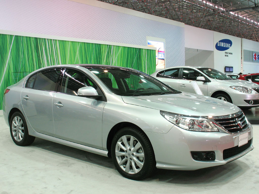 Renault Latitude 3.5 Privilege 2011